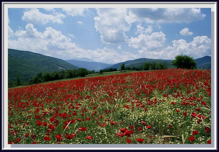 Poppy fields near Mount Ilgaz, Çankırı, Turkey